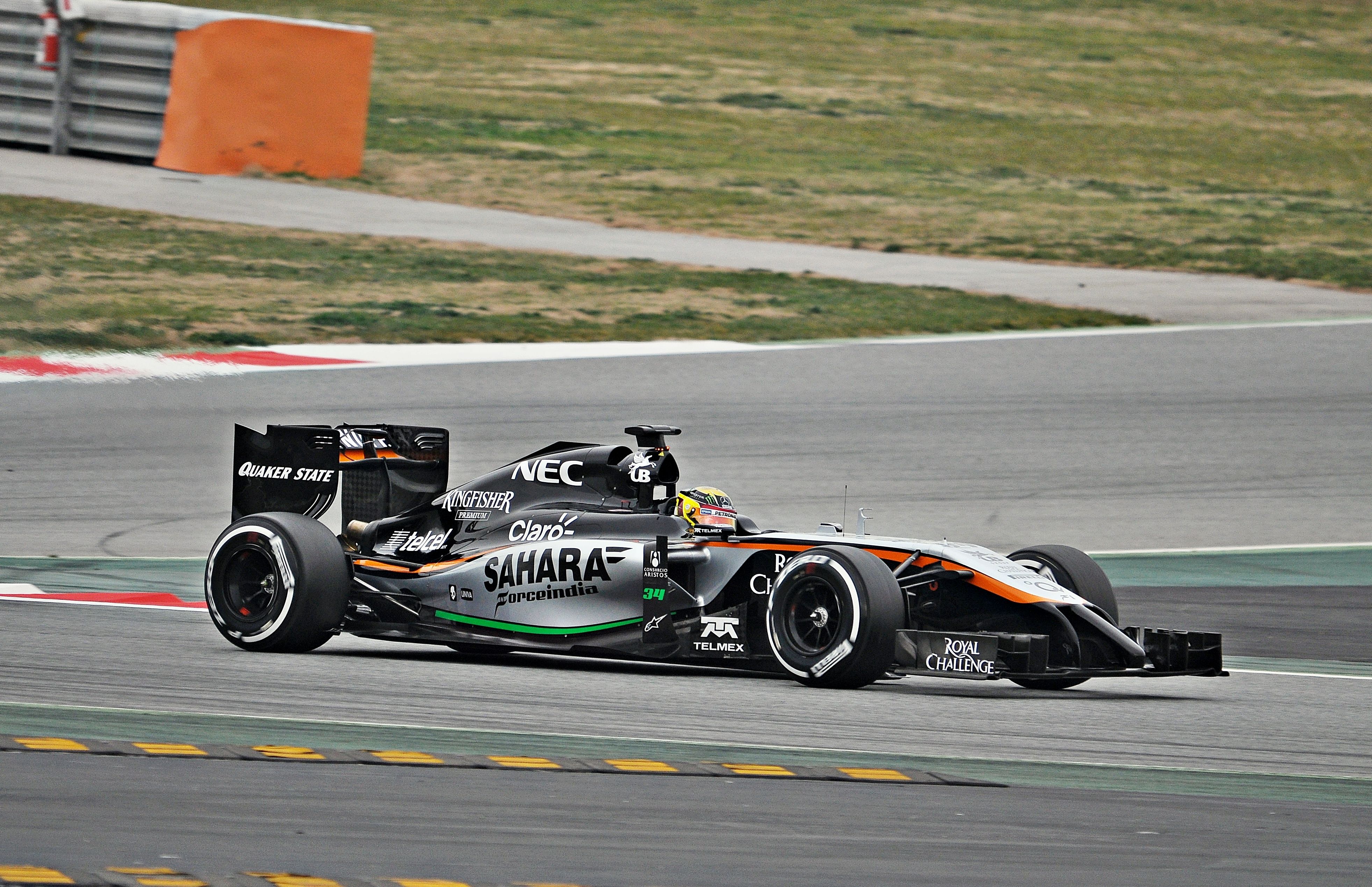 Test days Barcelona 2015